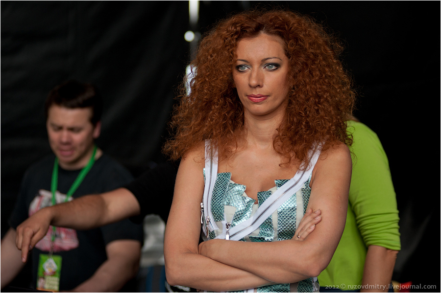 Юля Коган, группа "Ленинград", фестиваль "Рок над Волгой" 2012